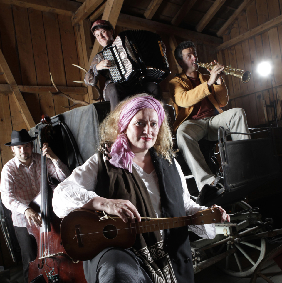 Corin Curschellas mit Albin Brun, Patricia Draeger und Claudio Strebel ("La Grischa"), im Frühling 2012.